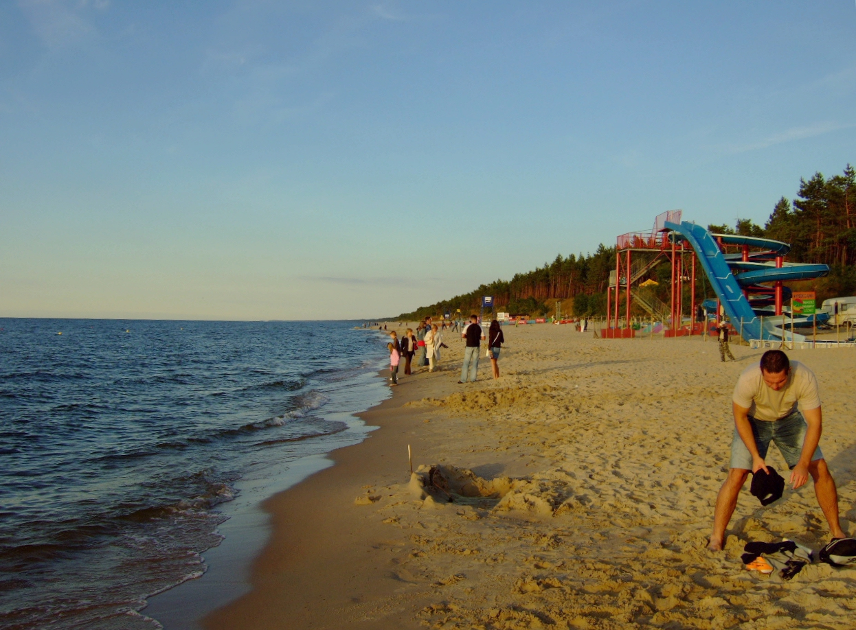 Strand in Stegna (Steegen), Polen